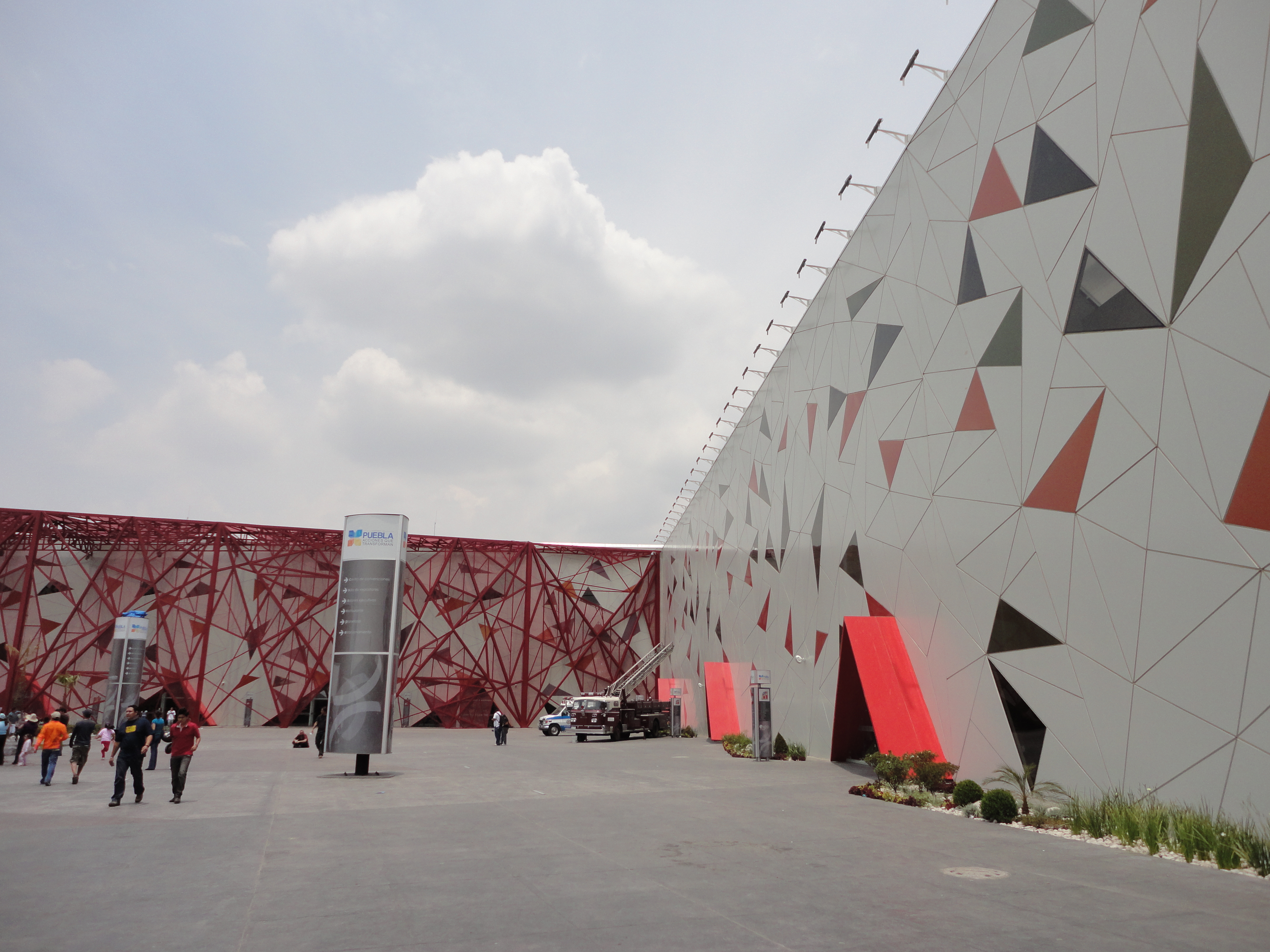 Recinto para congresos y exposiciones